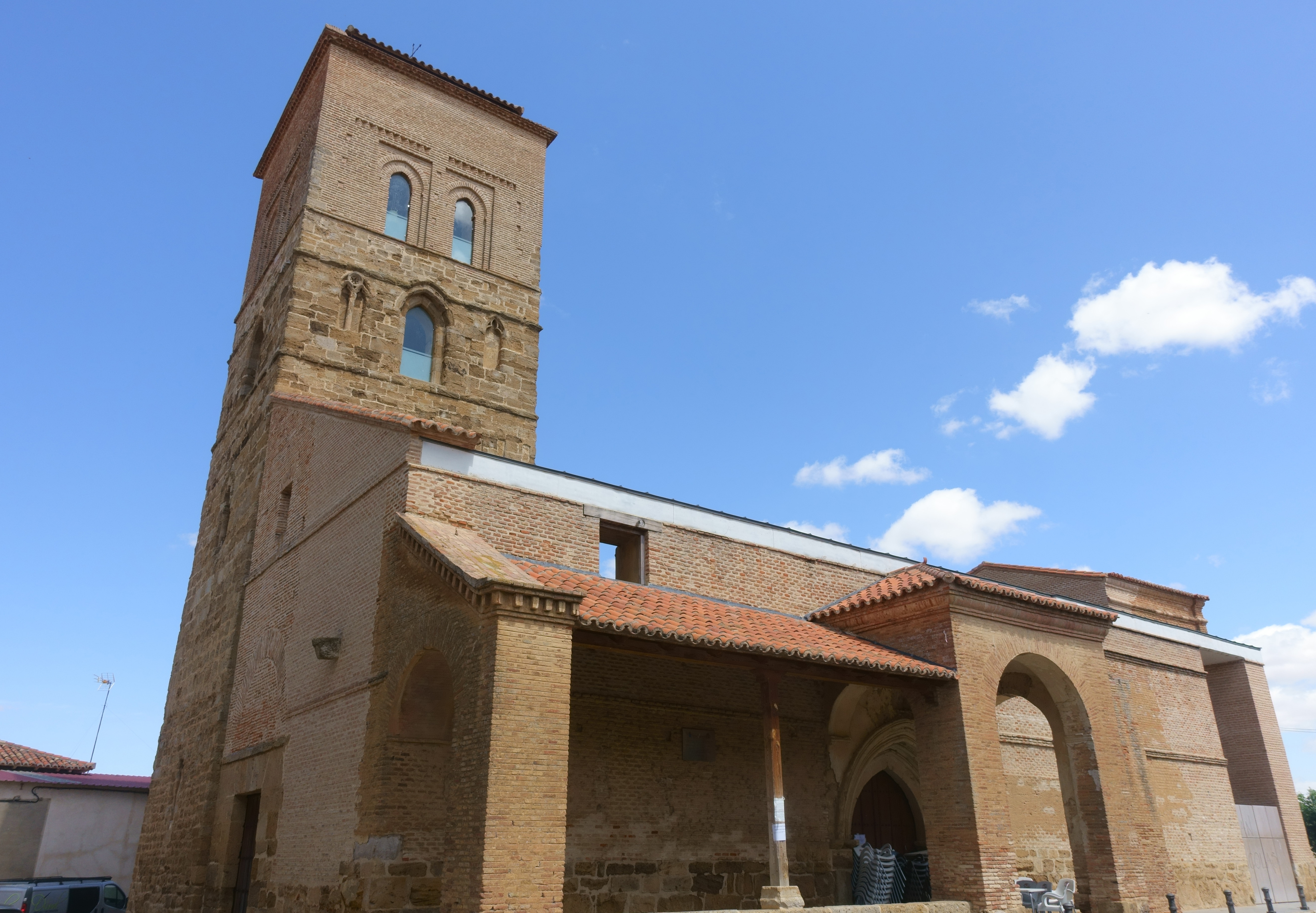 Iglesia de San Nicolás, Castroverde de Campos (Zamora, España).